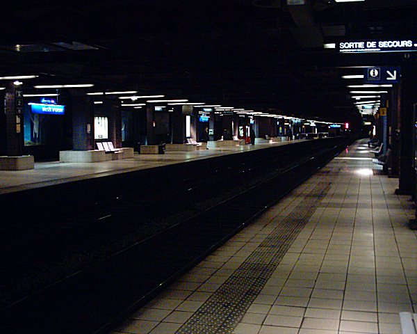 Gare d'Orsay, in 2006.